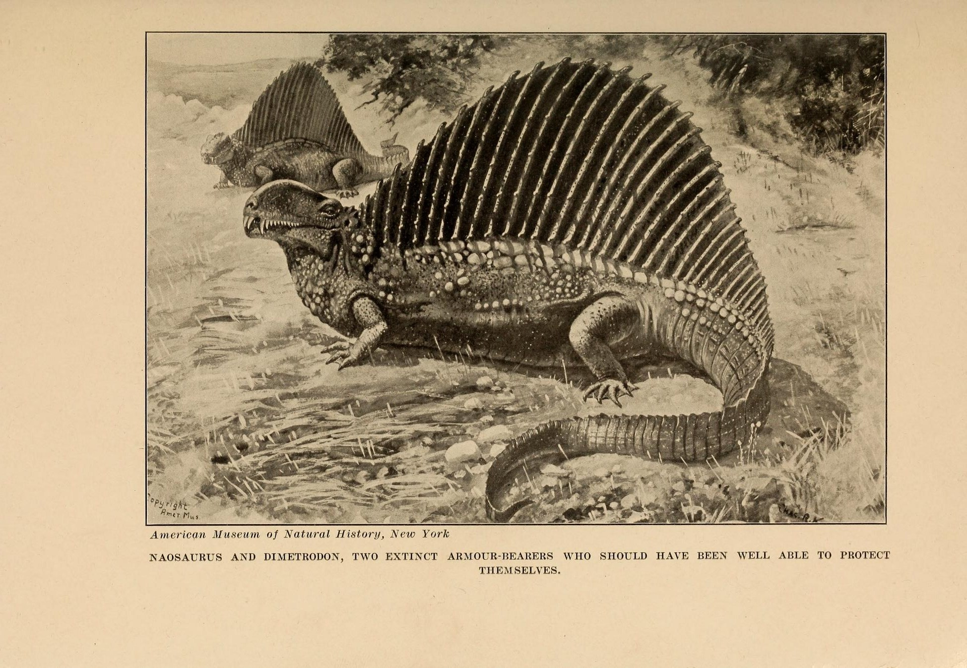 Naosaurus and Dimetrodon